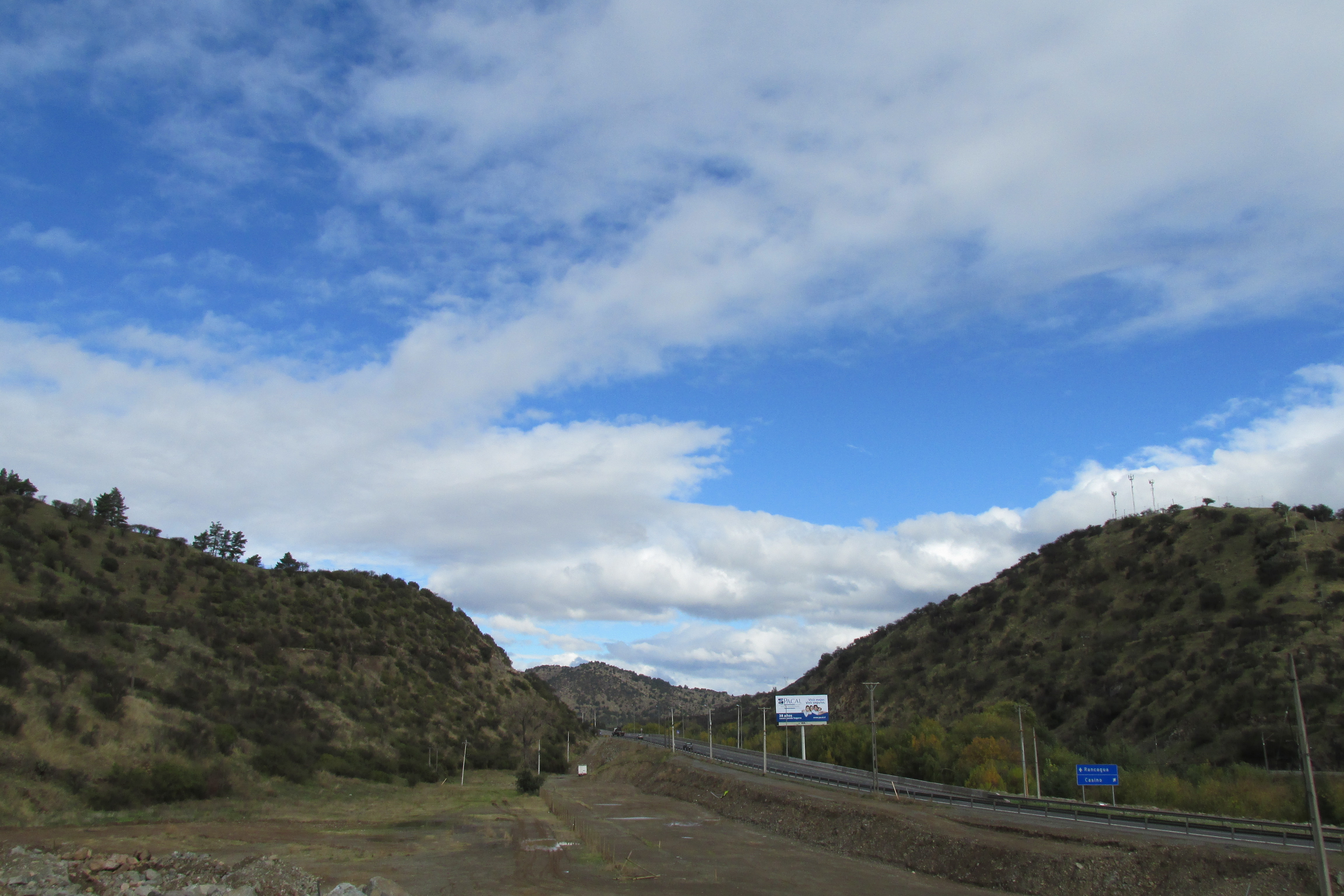 Ruta 5 Sur sector Angostura, región Metropolitana